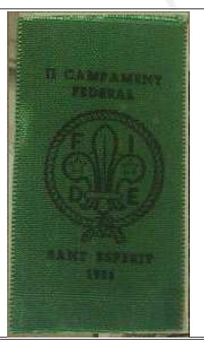 Insignia del Segundo Campamento de la Federación Ibérica de Escultismo (1951).